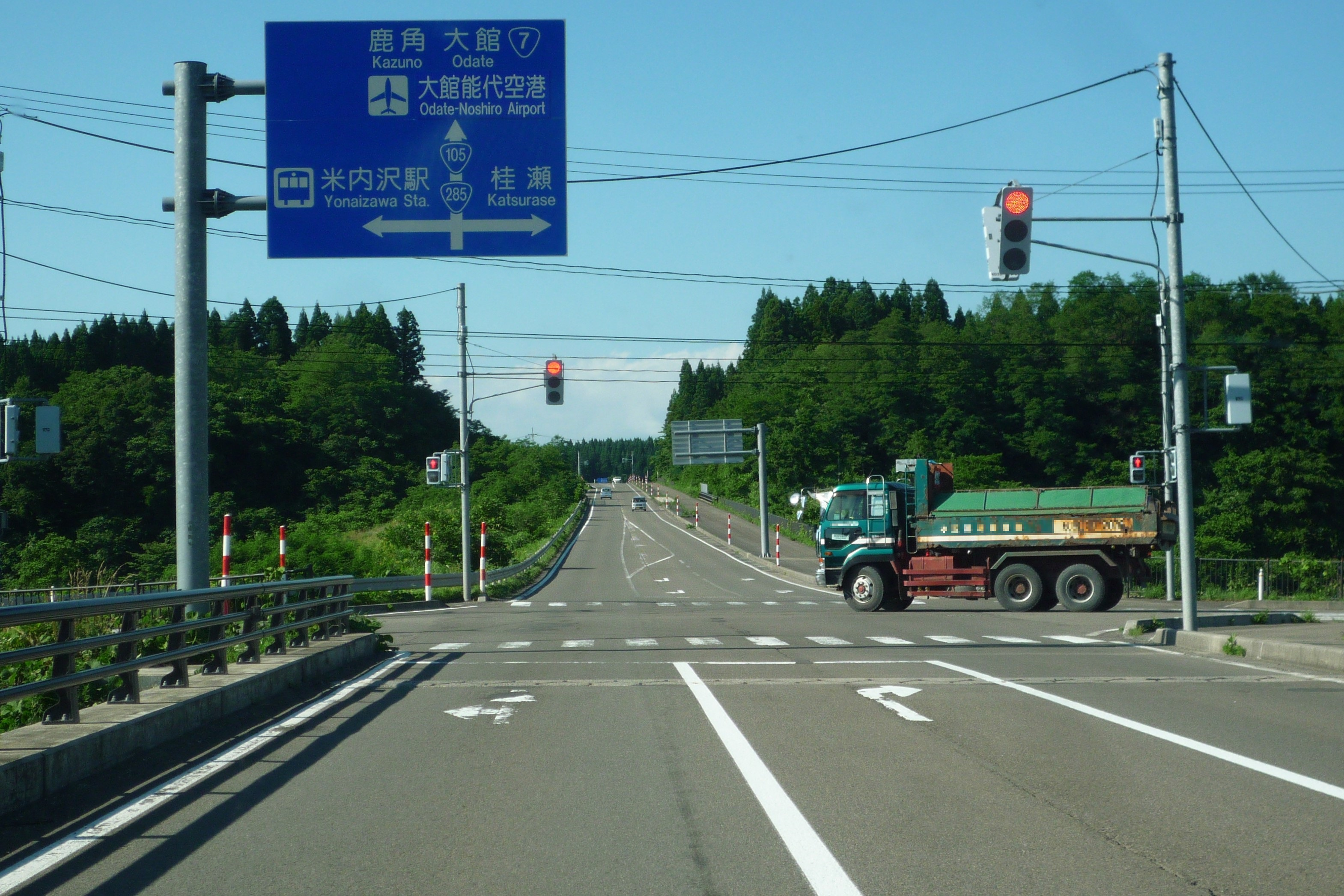 国道105号と285号の重複区間 米内沢バイパス（北秋田市）